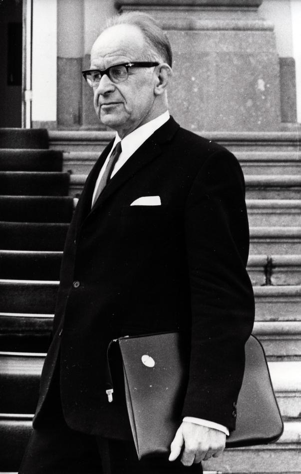 Voorzitter van de Eerste Kamer, M. de Niet (PvdA) bij paleis Huis ten Bosch. den Haag, Nederland, 3[maart] 1971.